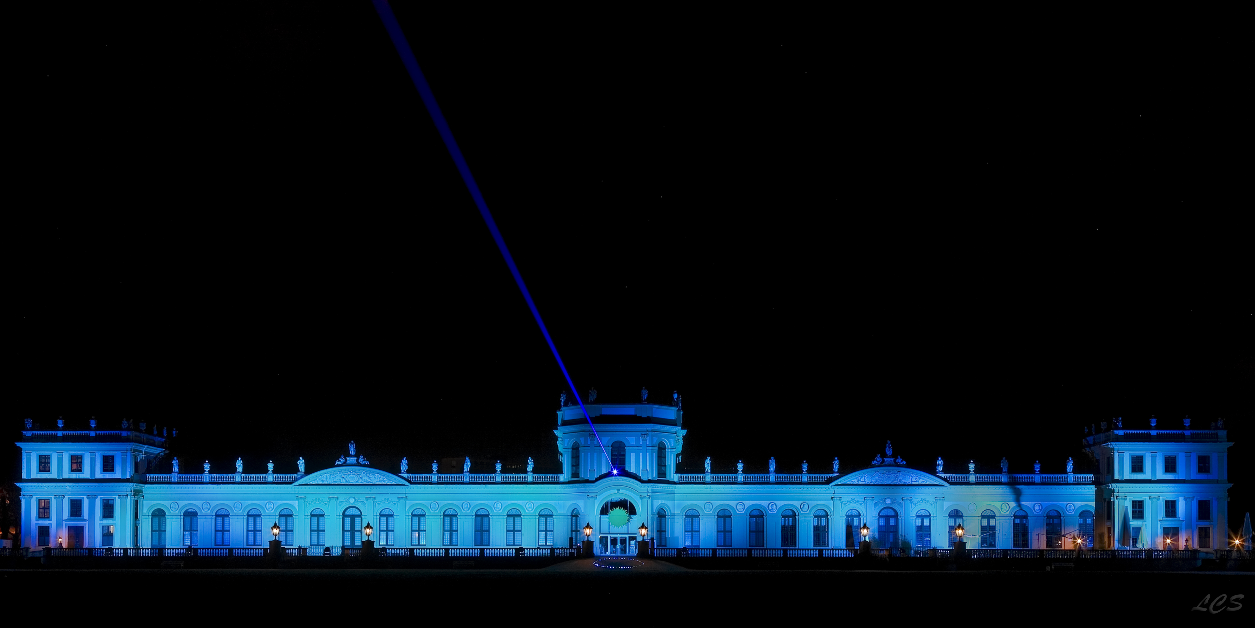 Für den Weltdiabetestag illuminierte Lichtkünstler Oliver Bienkowski die Orangerie in Blau. Fotograf für den Lichtkünstler : Laszlo C. Steinebach